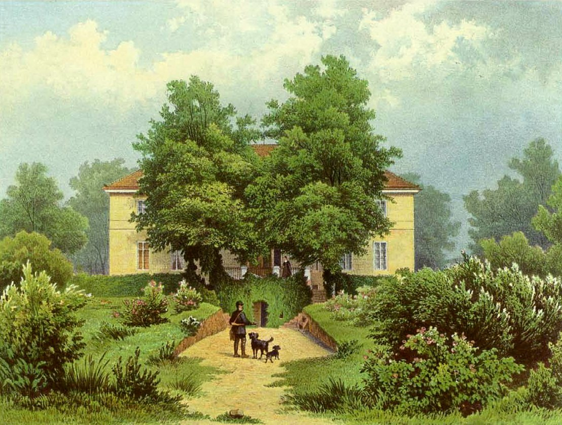 Rittergut Kawallen (Cawallen), Kreis Trebnitz, Provinz Schlesien